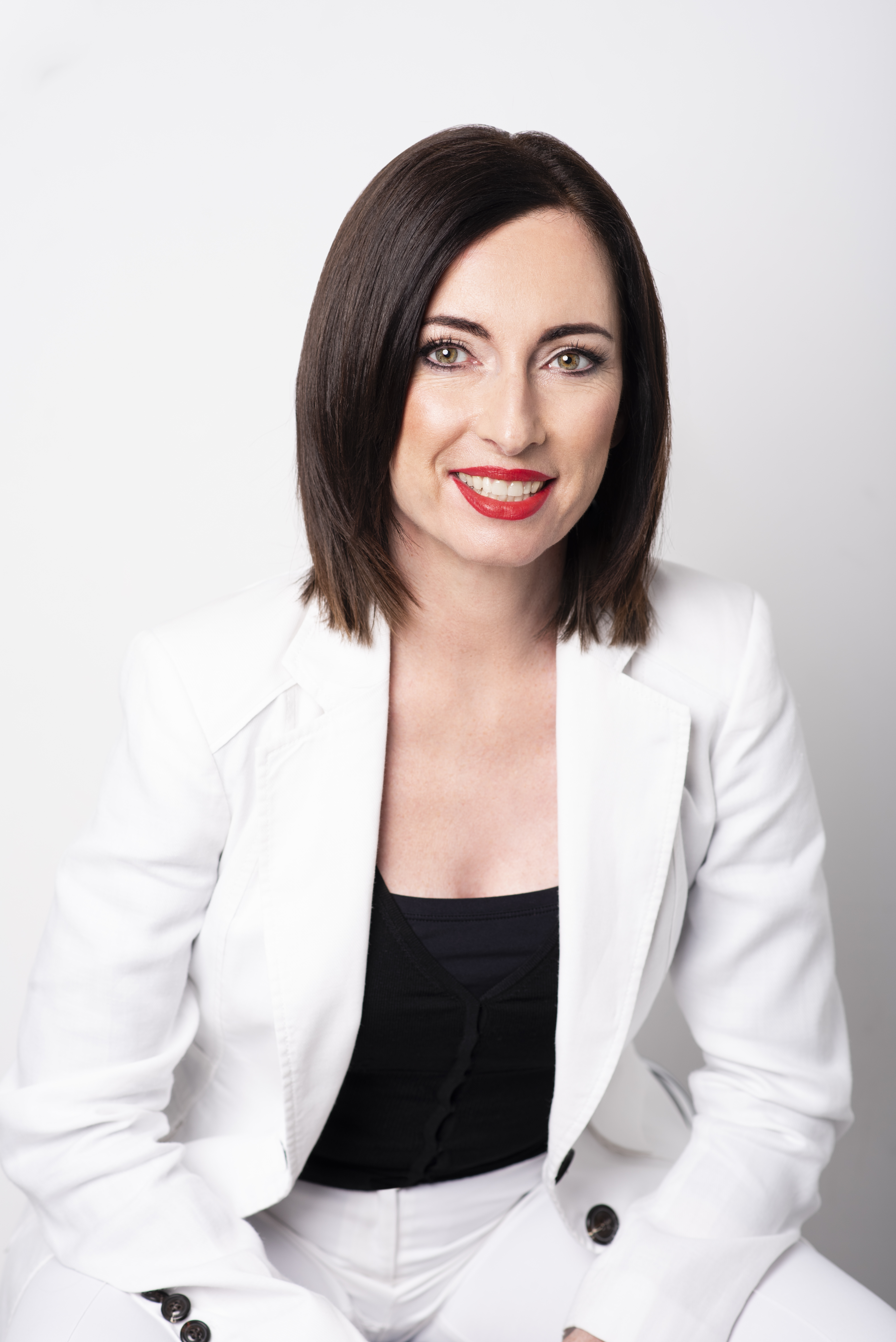 Portraitfoto von Dr. Manuela Macedonia, Neurowissenschaftlerin